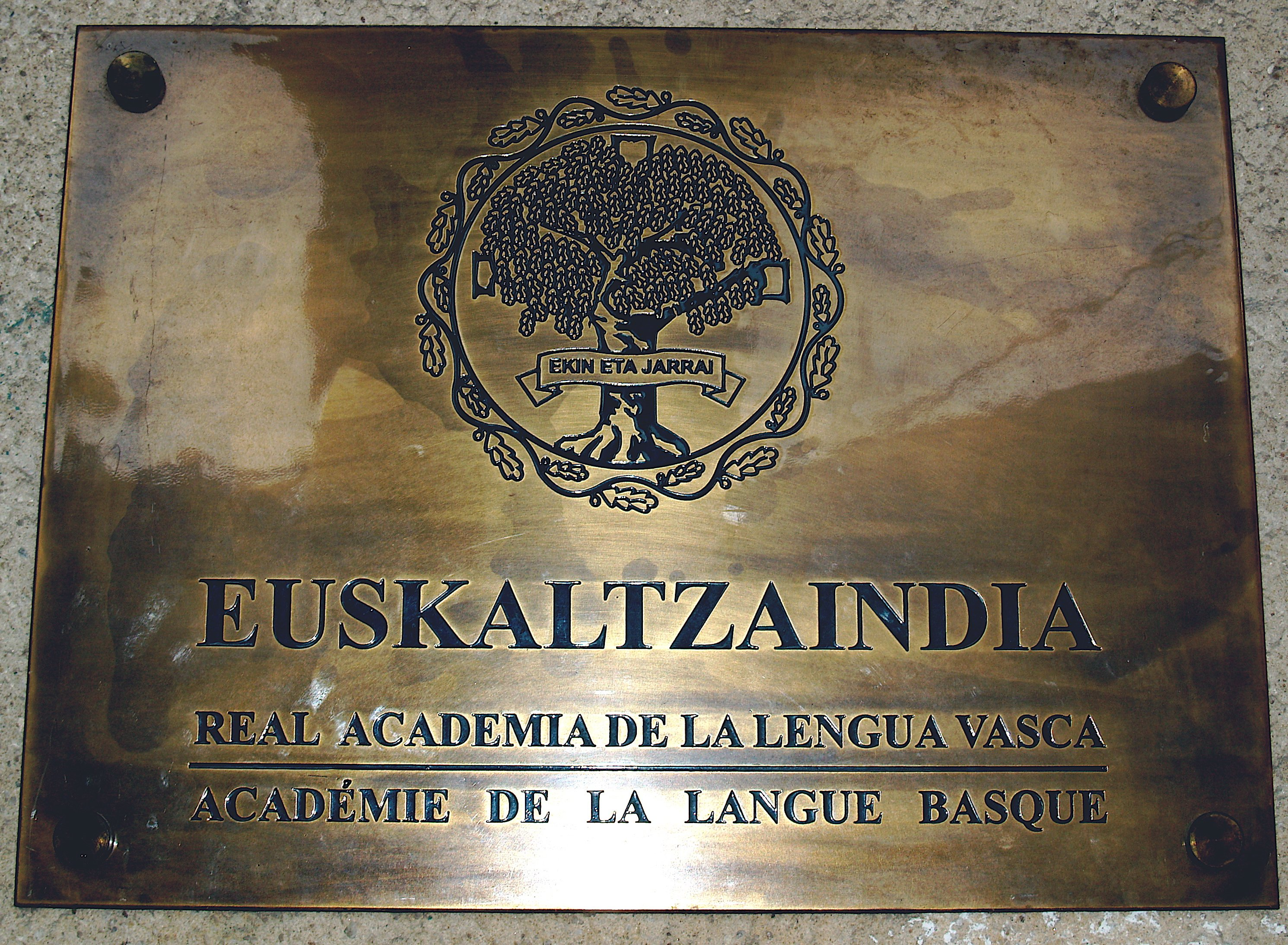 Euskaltzaindia (Zuretzat, Amaiur)